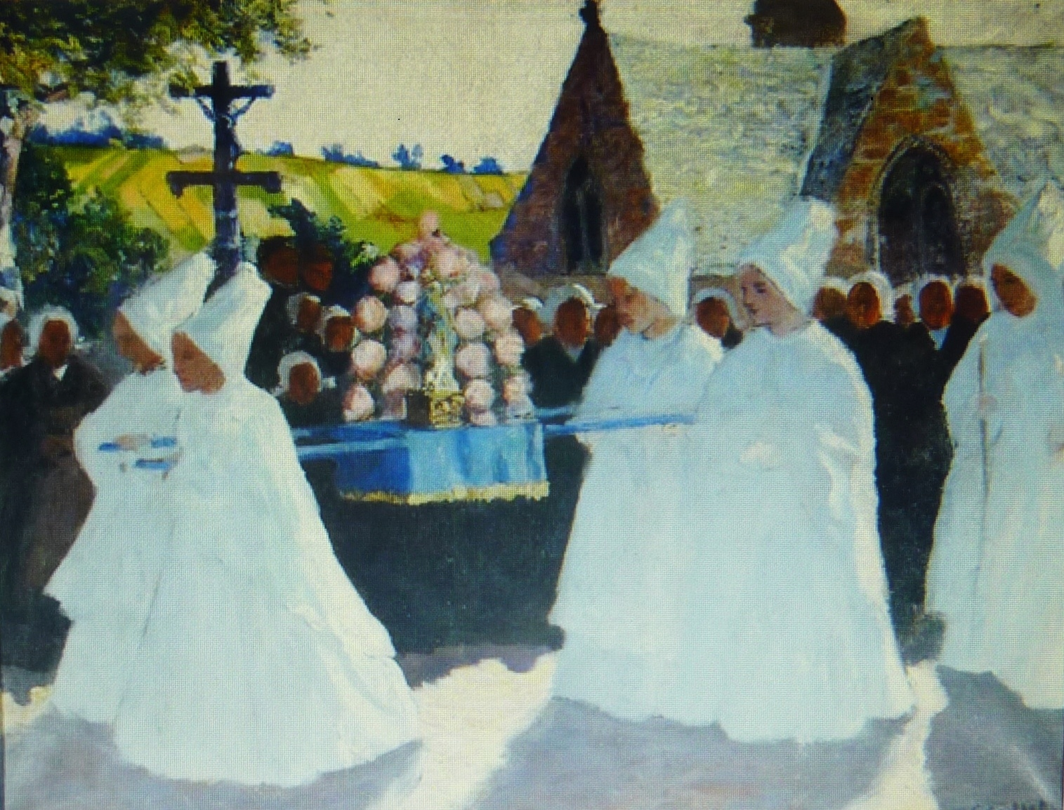 Charles Cottet : La procession de la Fête-Dieu à Landudec vers 1902" (manoir de Kerazan en Loctudy, fondation Astor)